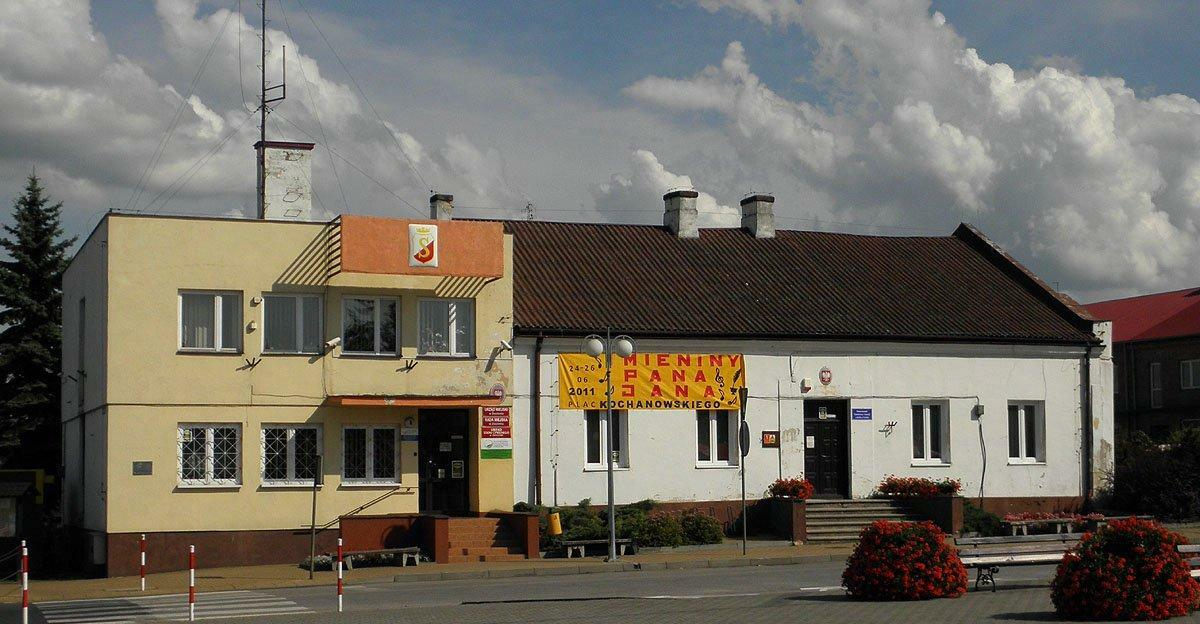 Budynki Urzędu Miasta.